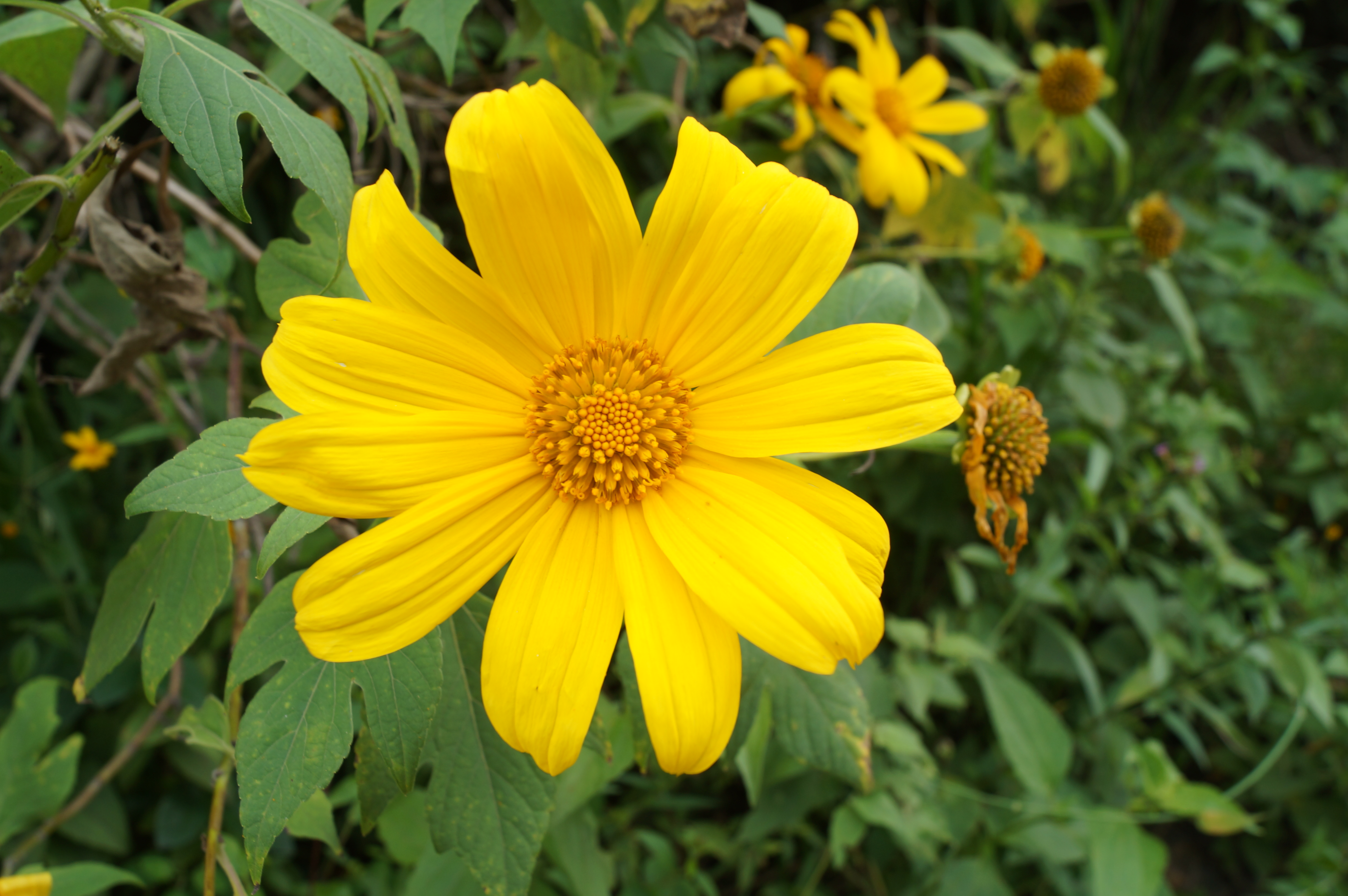 Tithonia diversifolia. Vulgarmente conocida en Venezuela como Arnica. Boconó, Edo. Trujillo Tithonia_diversifolia